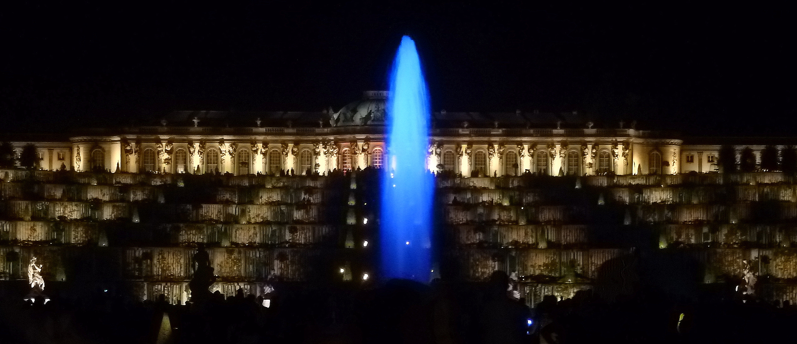 Die hochaufsteigende Fontaine am Schloss Sanssouci bei Nacht